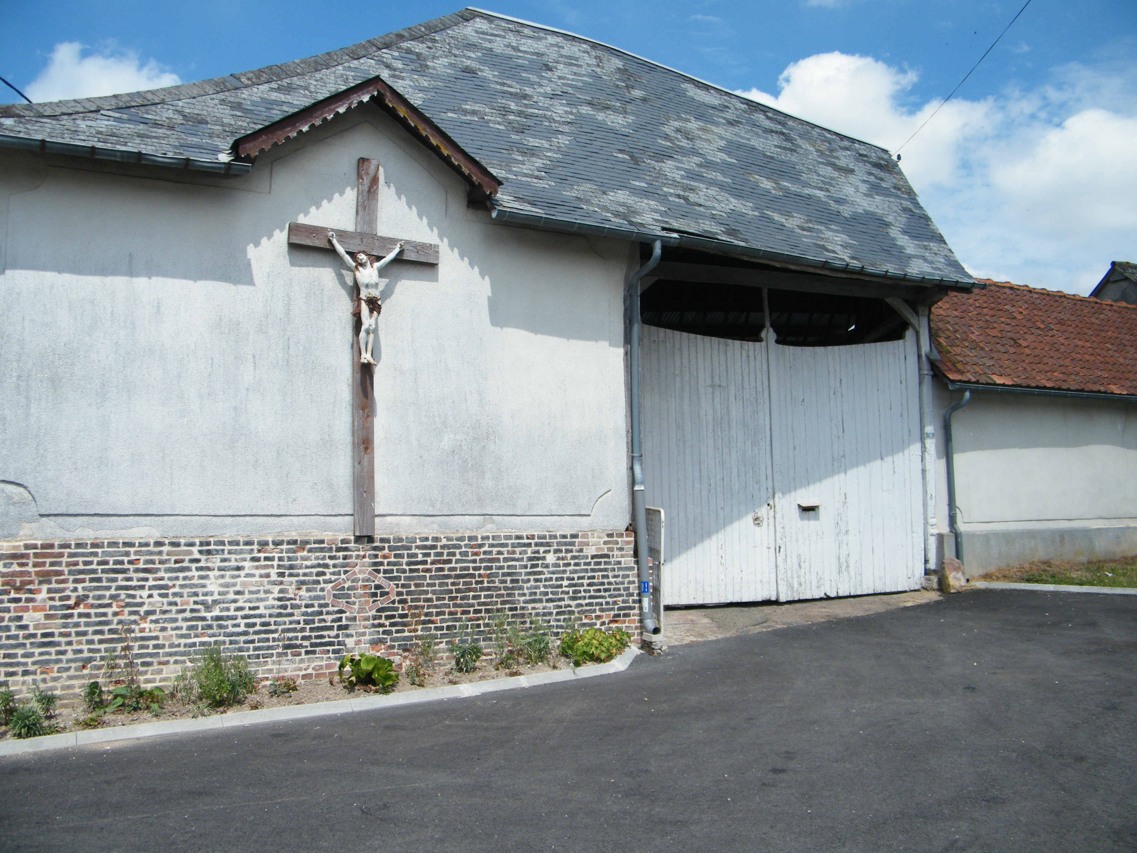 Doudelainville, Somme, France, calvaire.